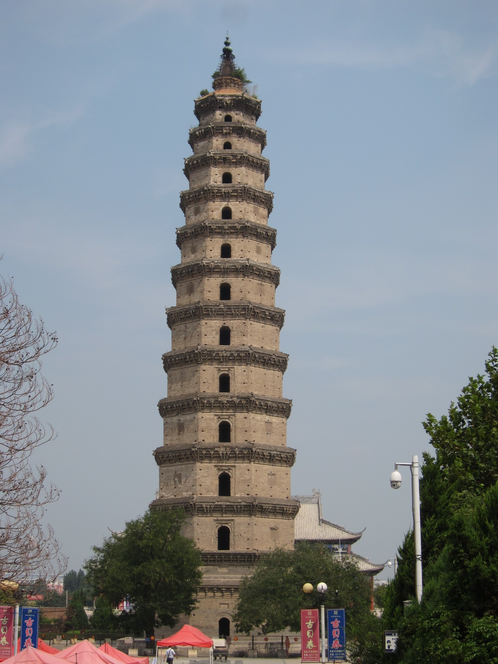 開福寺釋迦文舍利塔，俗稱景州塔，位於河北景縣。始建於北朝，北齊、隋代重修，現存建築為宋代風格，應是北宋時重建。1996年被列為第四批全國重點文物保護單位。